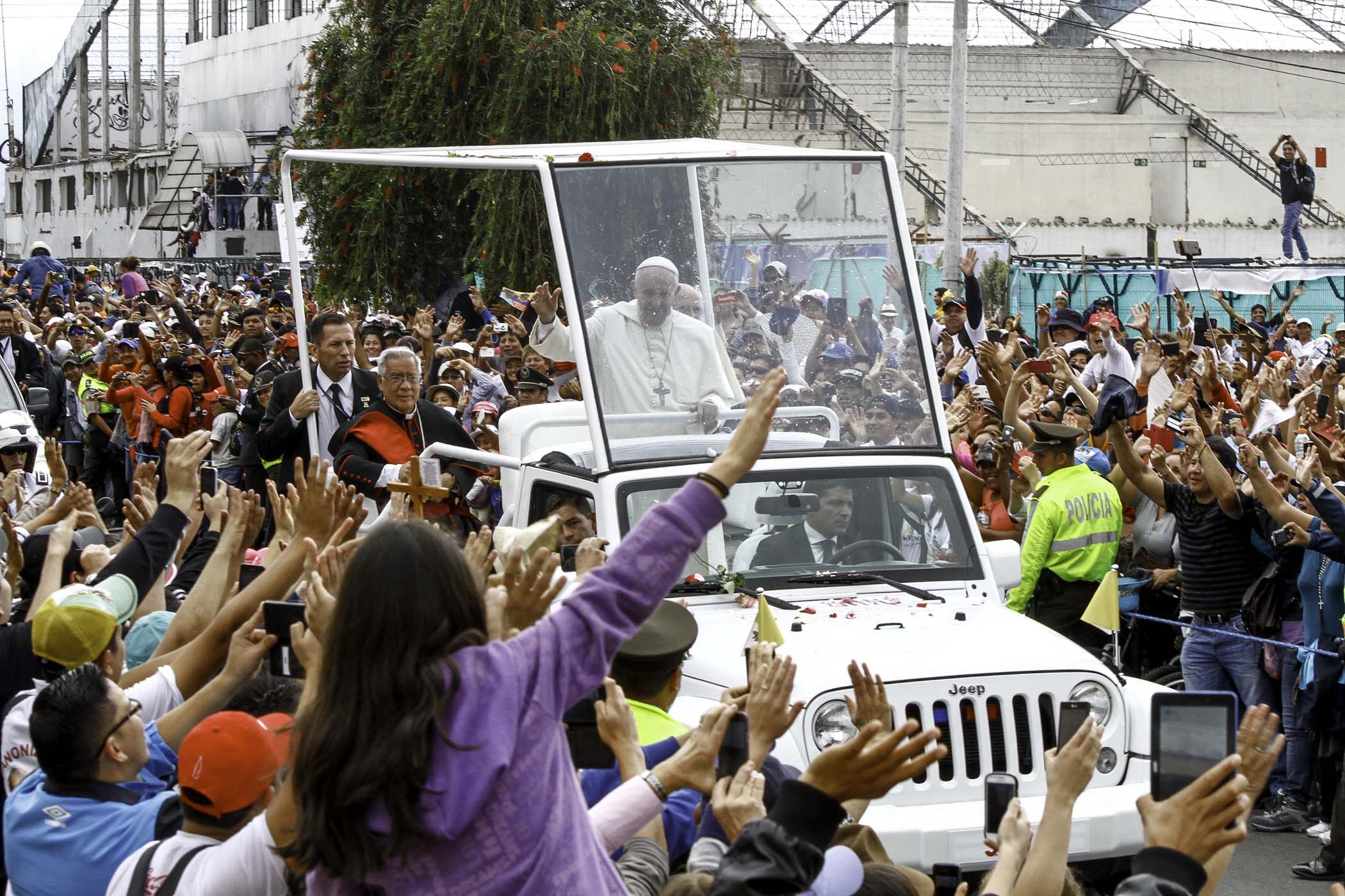 Quito, 07 jul (Andes).- Fieles católicos y comerciantes se agolpan en el parque Bicentenario para escuchar la misa y recibir las bendiciones del papa Francisco. ANDES/Micaela Ayala V.